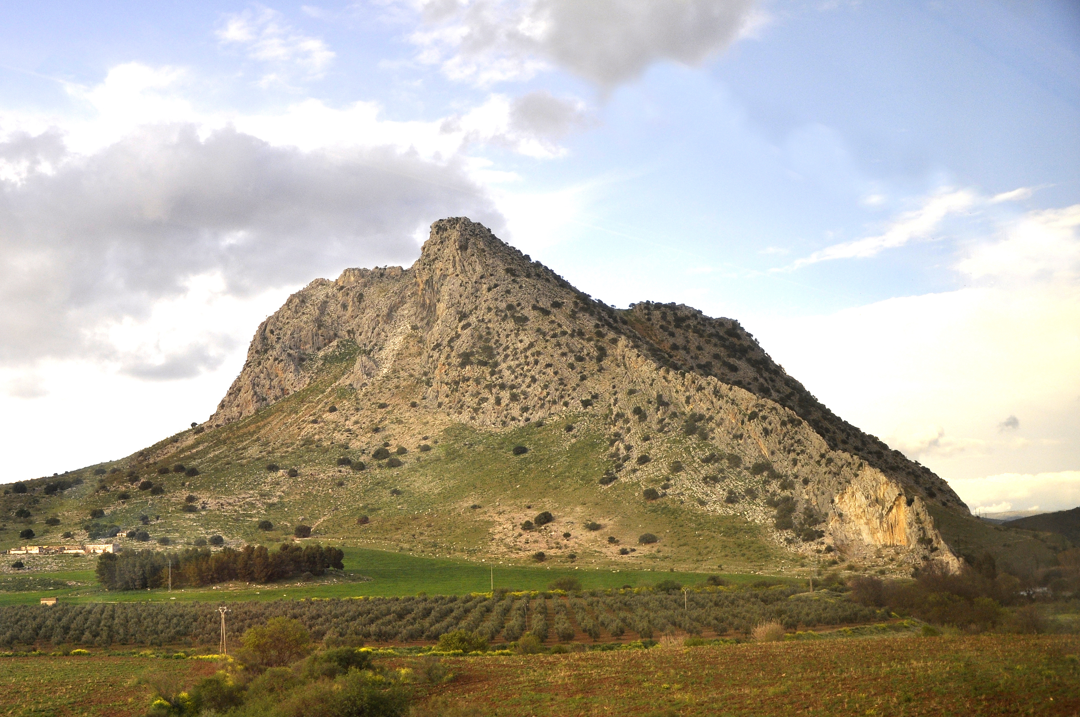 Antequera - Peña de los Enamorados ('Rots der Geliefden') vanaf de trein op de lijn tussen Sevilla en Granada